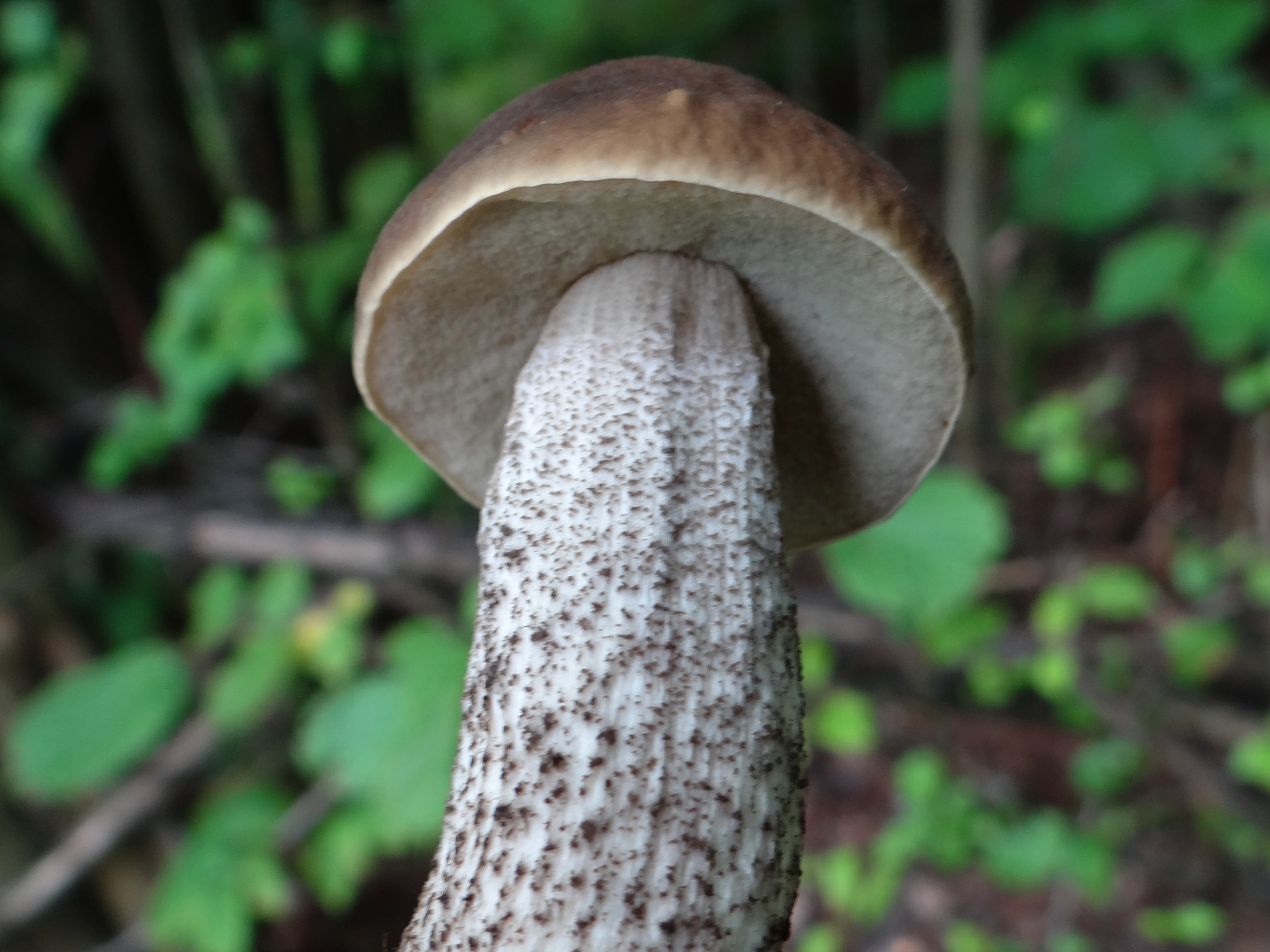 Leccinum pseudoscabrum